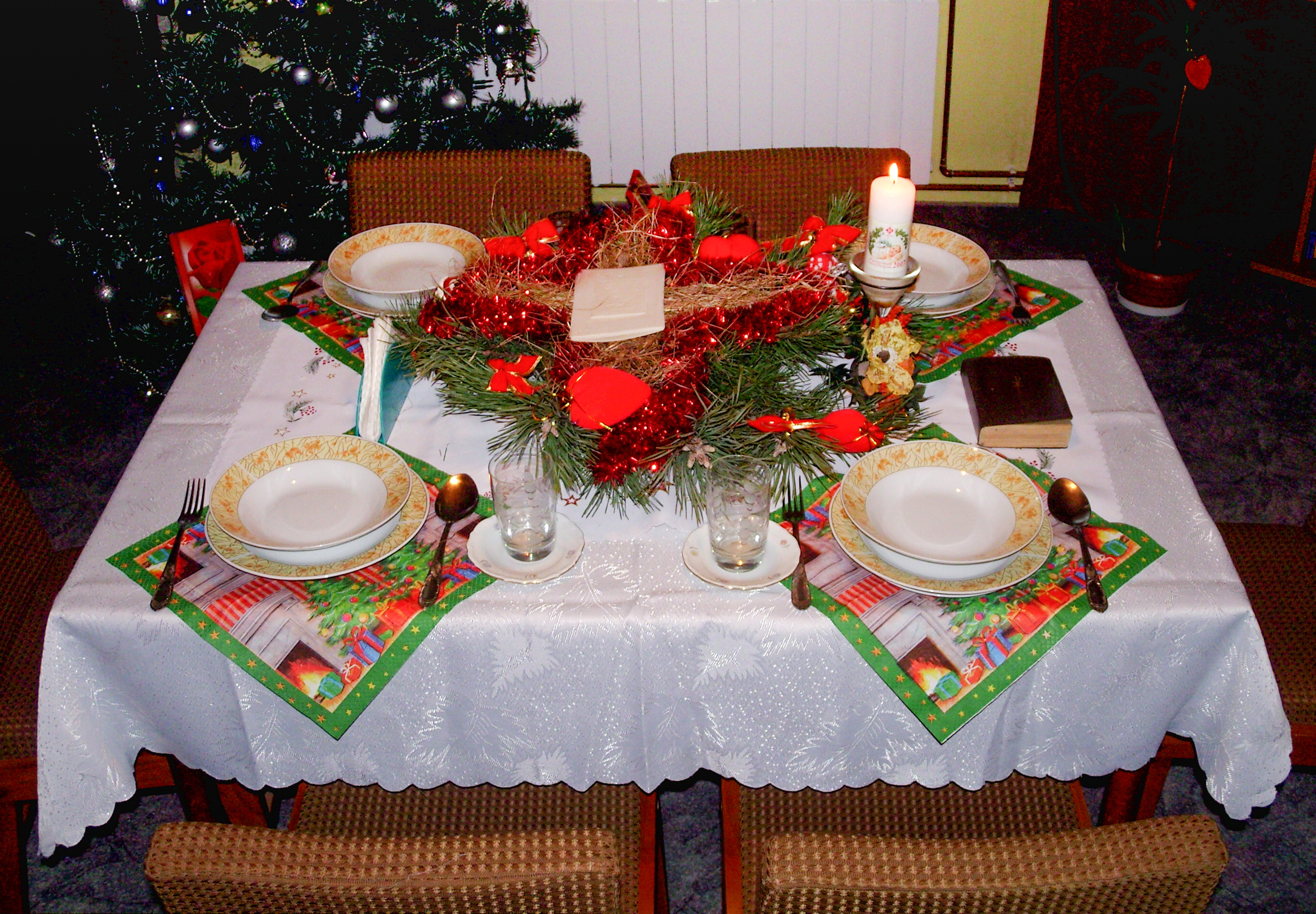 Stół wigilijny (wigilia Bożego Narodzenia)